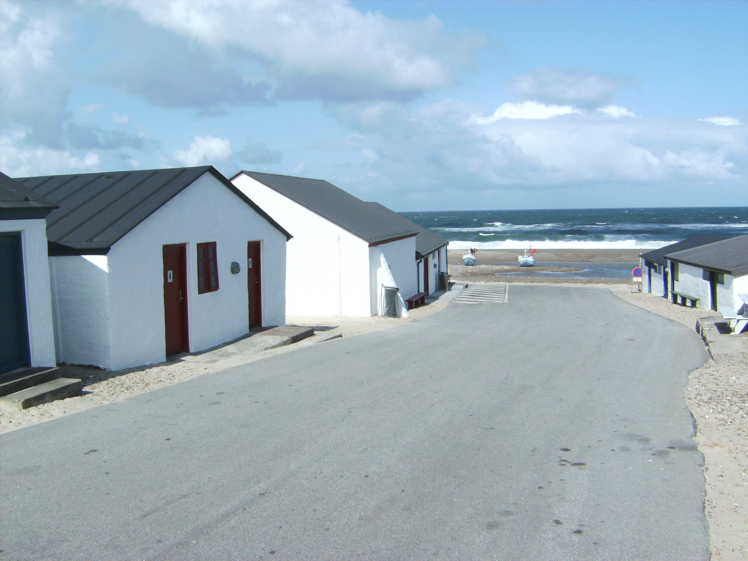 Stenbjerg Landingsplads er en ophalerplads for Veterhavskystfiskeri vest for Thisted Former fishingplace in Jylland, Denmark Husene set mod vest